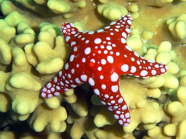 Fromia ghardaqana en Mar Rojo